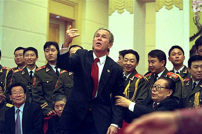 中文（中国大陆）: 2002年的布什和江泽民